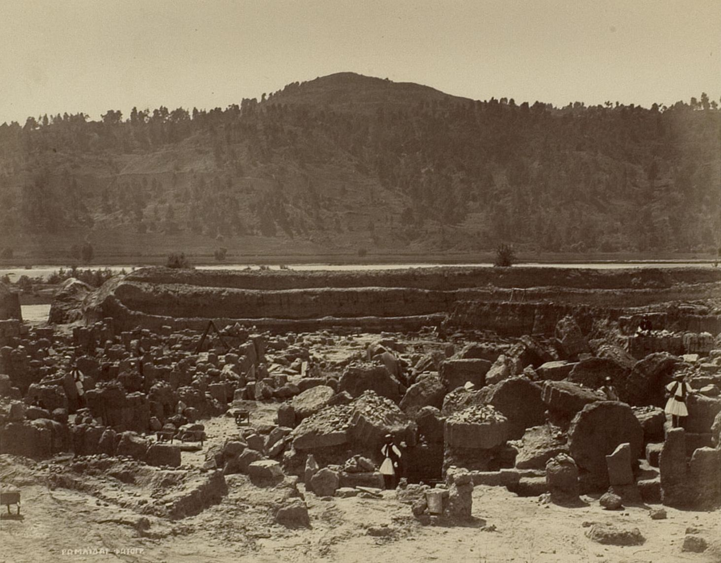 Ausgrabungsfeld von Norden. Die Säulentrommel an der Nordostecke des Tempels fowie eine andere an ihrer Stelle befindliche der Ostfront sind durch Menschen bezeichnet (s. Taf. IV. V.), ebenso die geneigte Säulentrommel vor der Ostseite, unter welcher der Kopf und Oberleib des sitzenden Mannes (Taf. XVII.) lagen, und in deren nächster Umgebung auch die Statuen auf Taf. XXII und XXIV gefunden wurden. In den späteren Bauten ist der dreieckige Block, welcher die Inschrift des Paeonios trägt. (Taf.XXXIl, 2) markirt. Im Hintergrunde der Alpheios und die Berge Triphyliens.